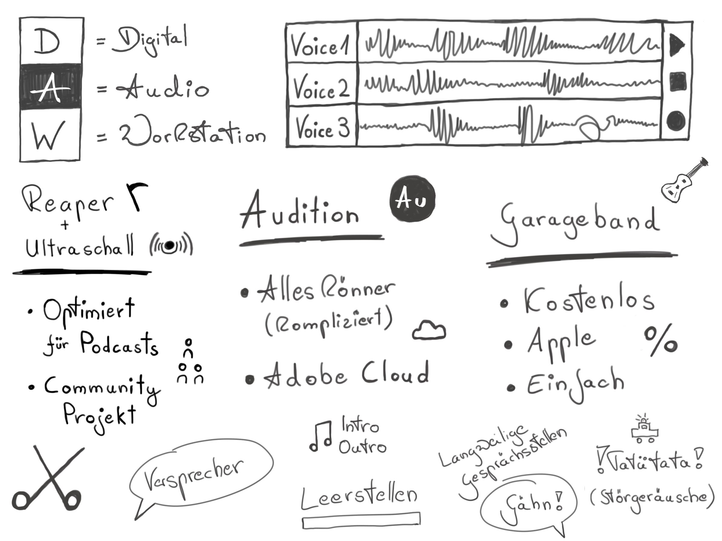 Übersicht über verschiedene Aufnahme-Möglichkeiten für Podcasts in Form einer Sketchnote.